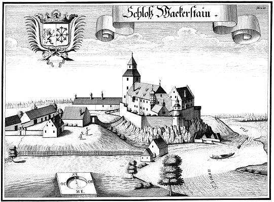 Kupferstich von Michael Wenning um 1700: Schloss Wackerstein, im Ortsteil Wackerstein des Marktes Pförring, Oberbayern